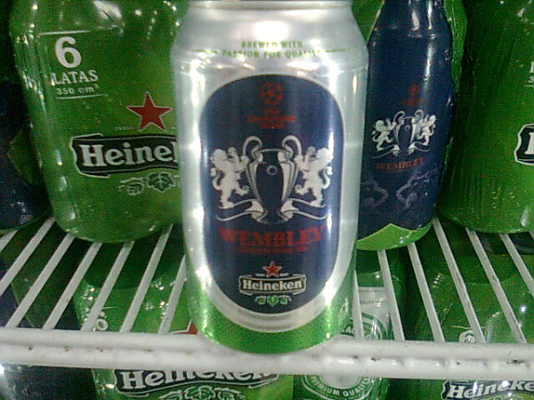 Lata de Cerveza Heineken con el logo de la UEFA Champions league 2010-2011